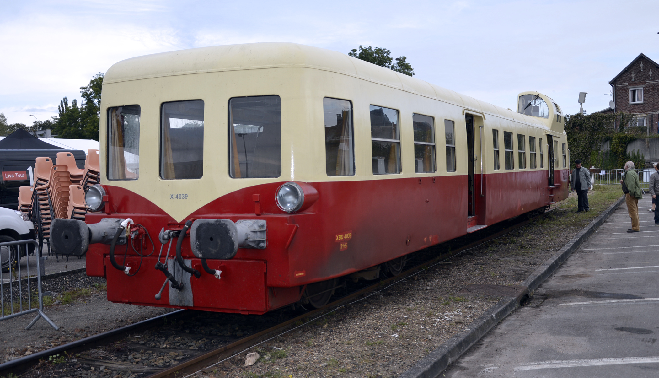 Un X 3800 (x 4039) à Longueau lors de la fête du rail en octobre 2013